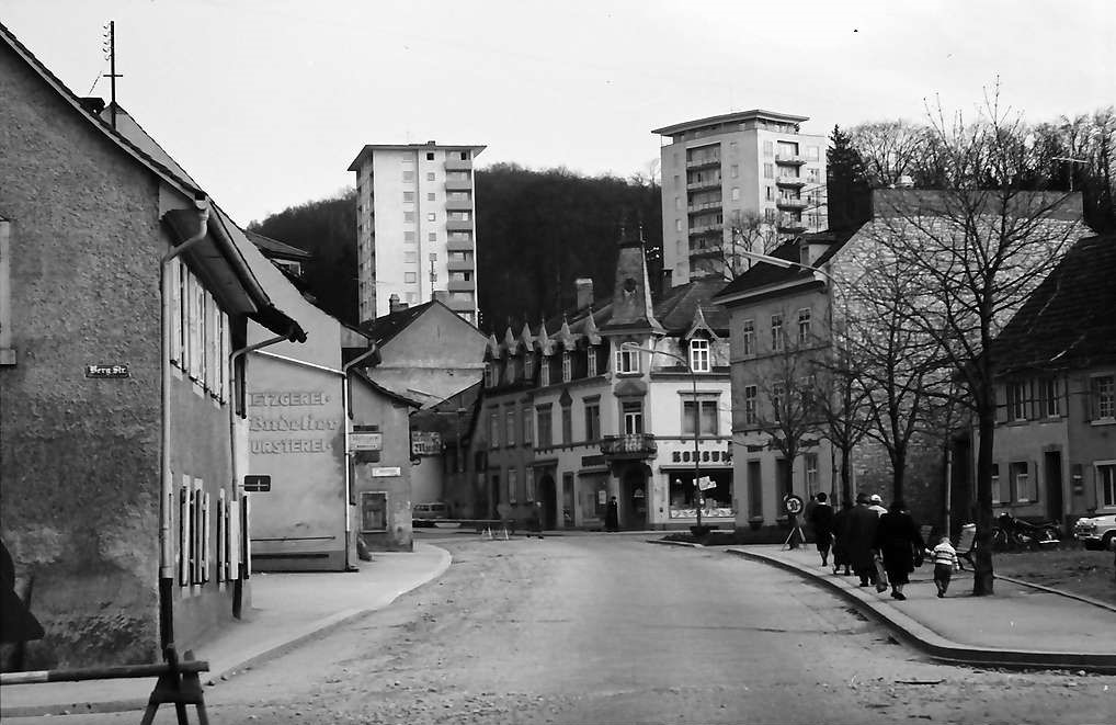 Lörrach: Rheinfelderstraße (heute: Wallbrunnstraße) mit Hochhäusern Schützenwaldweg 10 und 14. Standort des Bildes war die Kreuzung am heutigen Engelplatz.